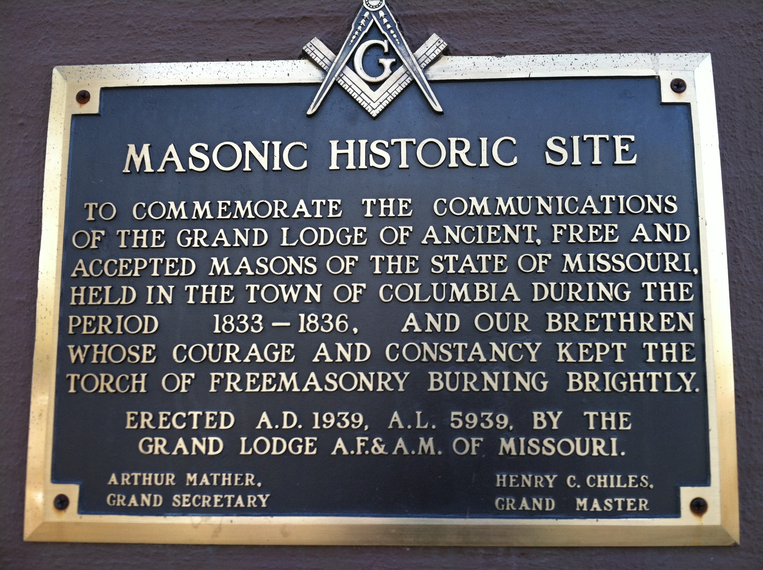 Marker in downtiwn